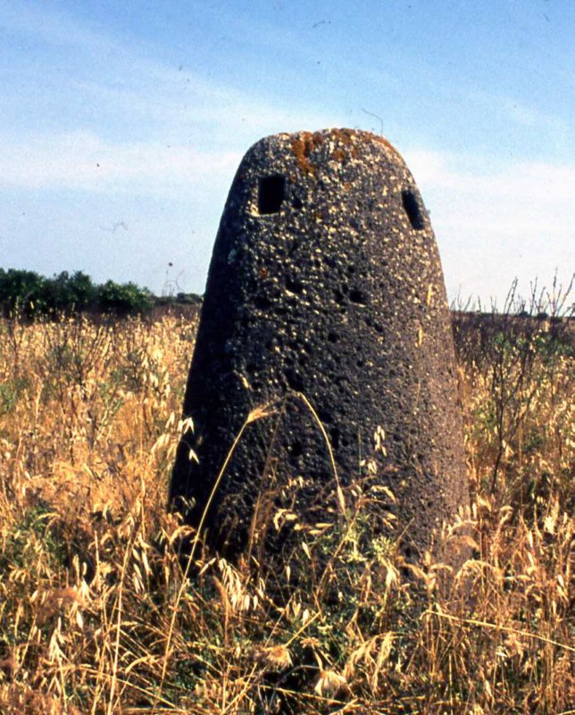 Baityloi